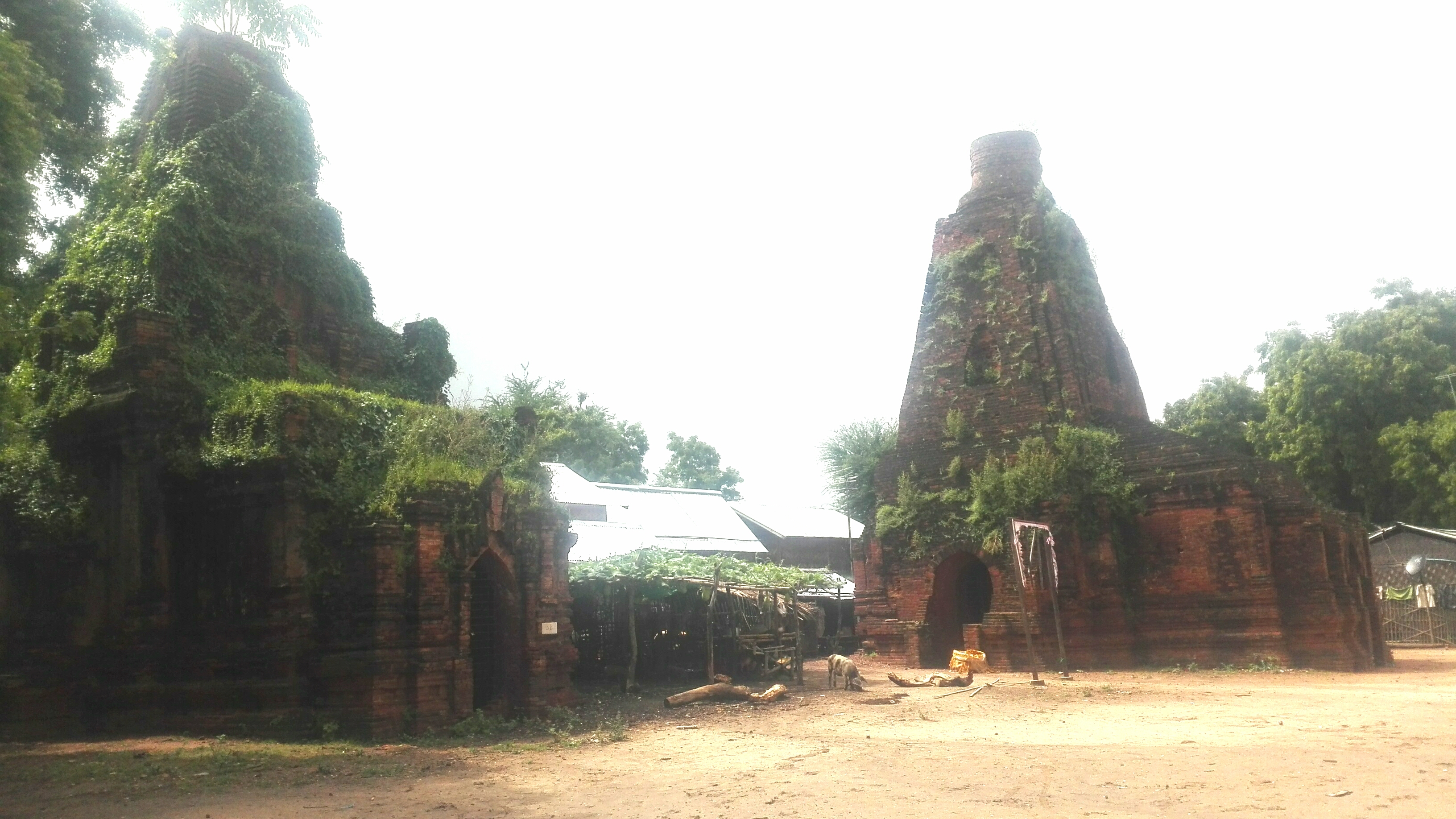 မြင်ကွန်းဘုရင်၏ စေတီတော်ဟောင်း